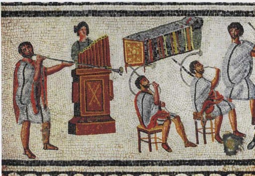 Mosaïque de Zliten